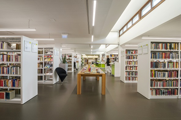 Internetheader für die neue Seite der Otto-Rombach-Bücherei, Bietigheim-Bissingen. 26. November 2013